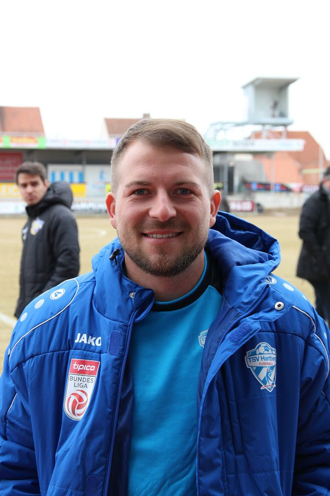 Christoph Kröpfl (Hartberg)